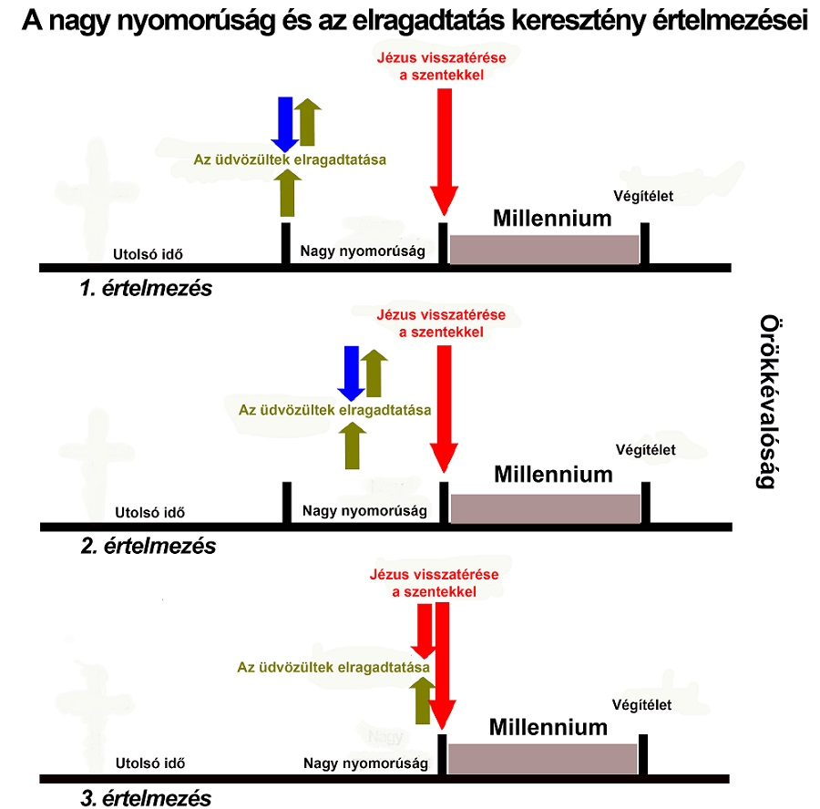 A nagy nyomorúság és az elragadtatás